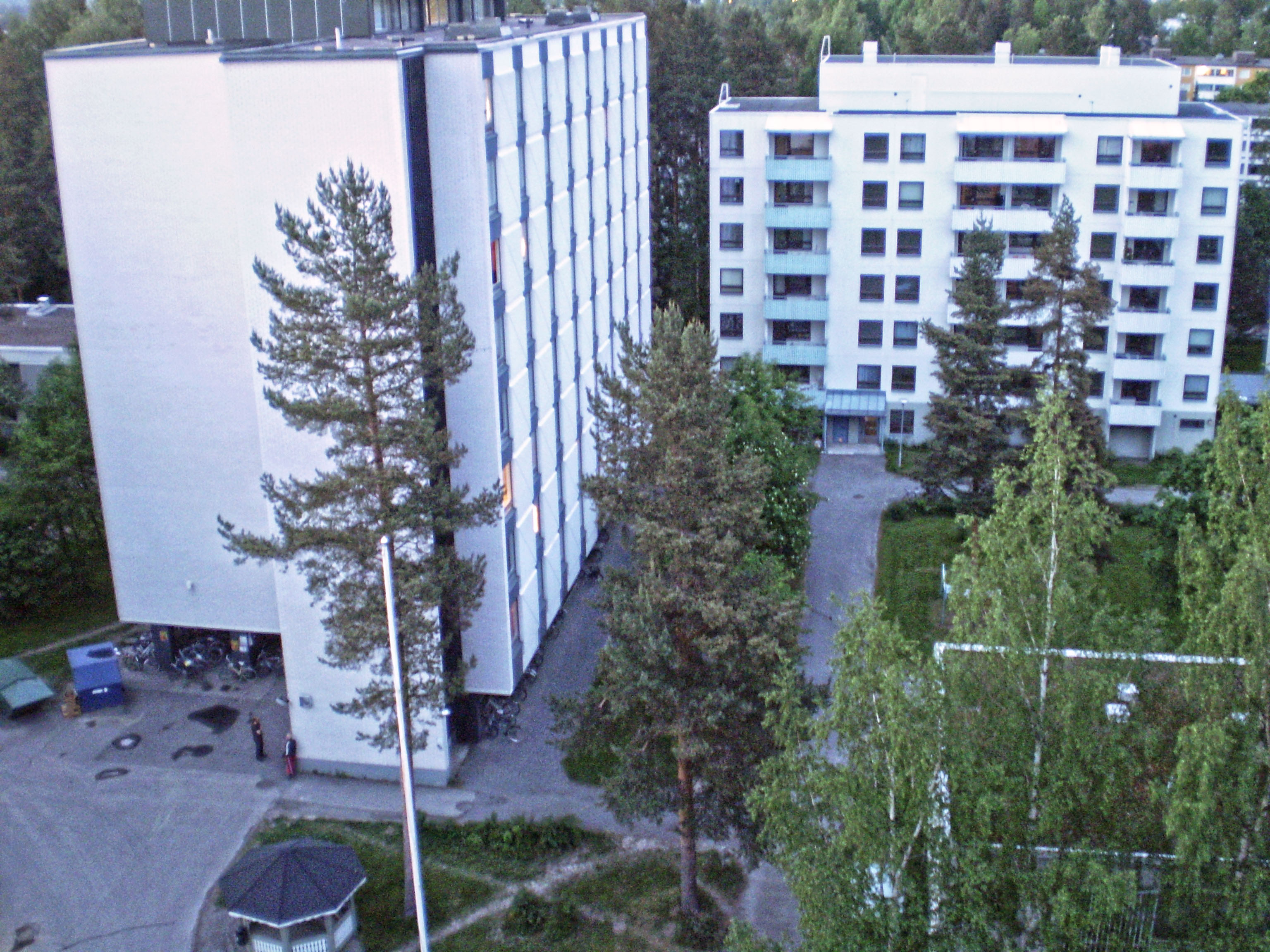 Kortepohjan ylioppilaskylän D- ja S-talot